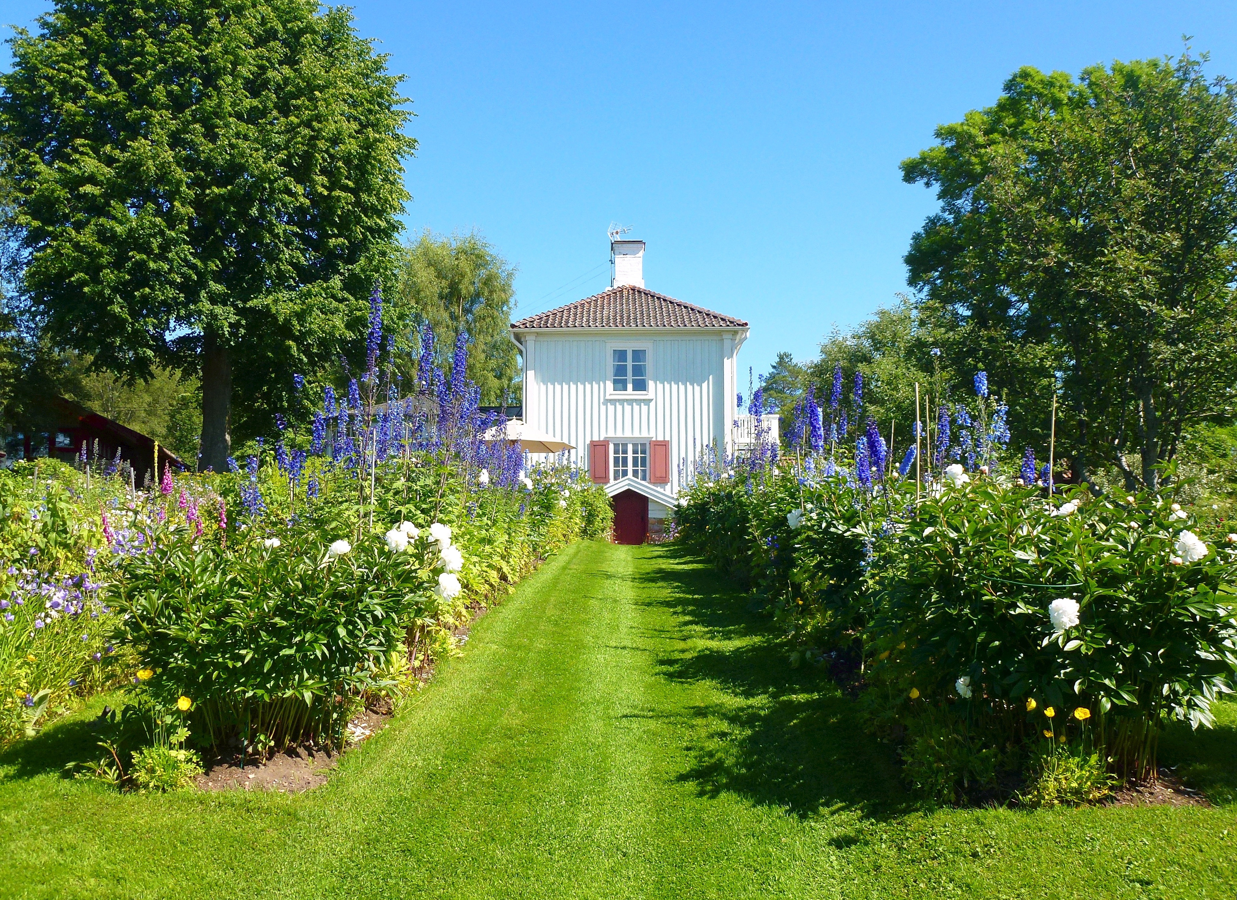 Karlfeldtsgården Sångs i Sjuagre, trädgården med huvudbyggnaden i bakgrunden